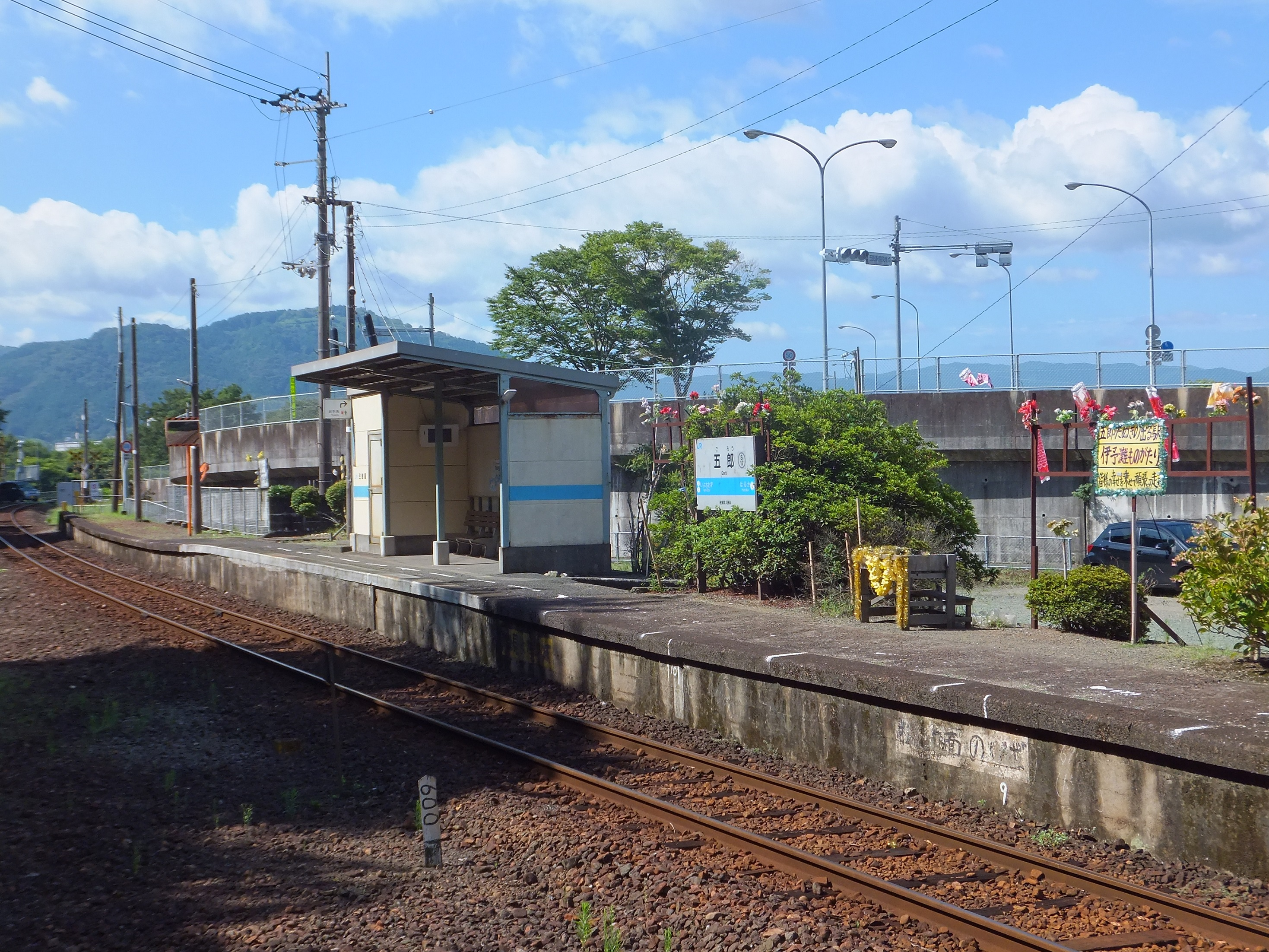 愛媛県大洲市 JR予讃線 五郎駅